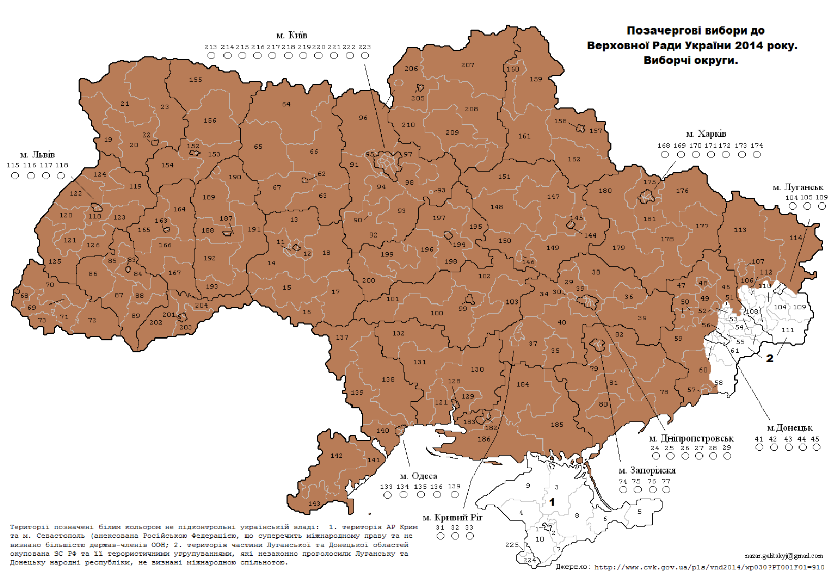 Позачергові вибори до Верховної Ради України 2014. Виборчі округи.